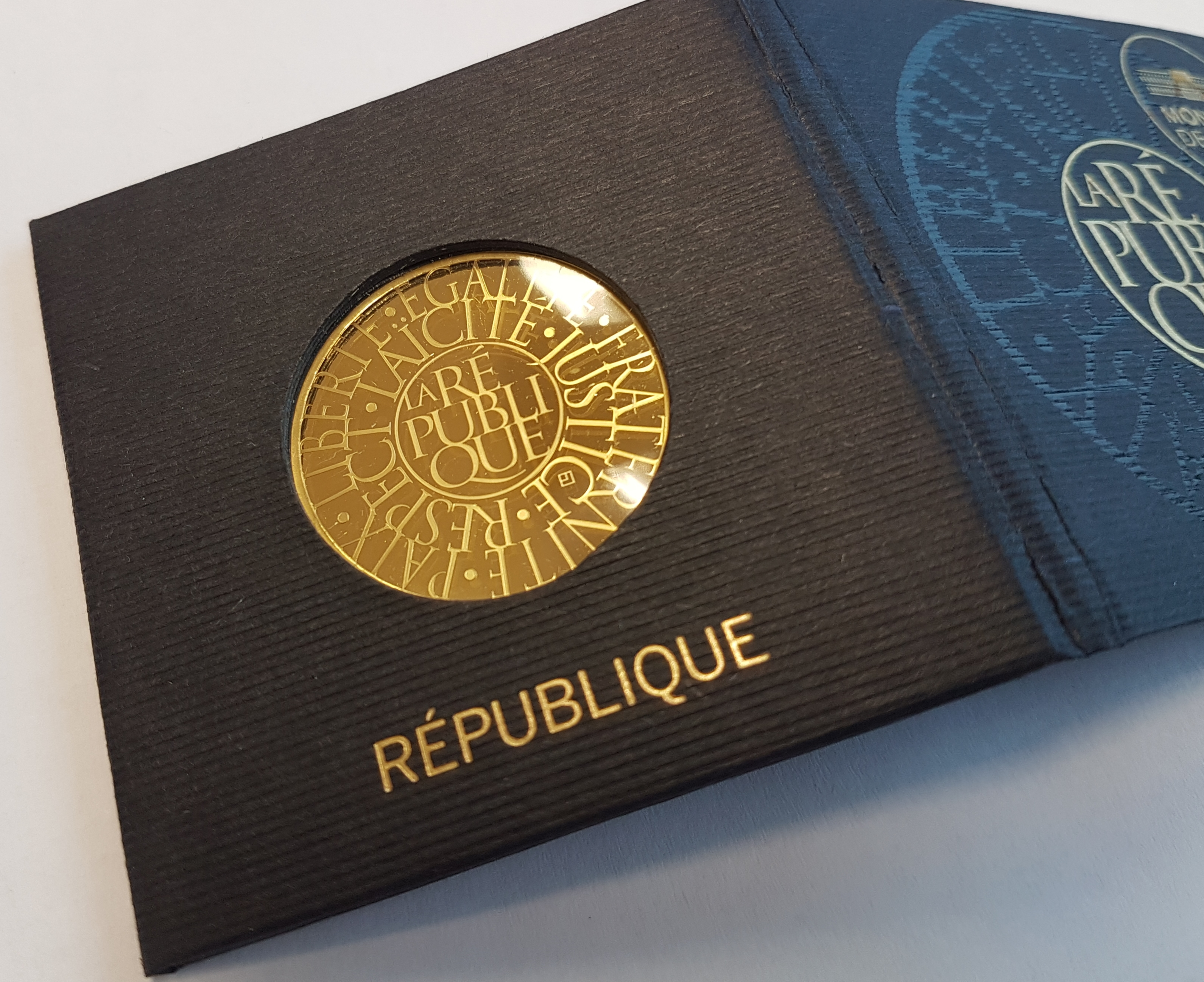 Die Bildseite der Münze ist mit kreisförmig angelegter Schrift versehen, die die Worte LIBERTE·EGALITE·FRATERNITE·PAIX· RESPECT·LAÏCITÉ·JUSTICE· LA RÉ PUBLI QUE abbilden.